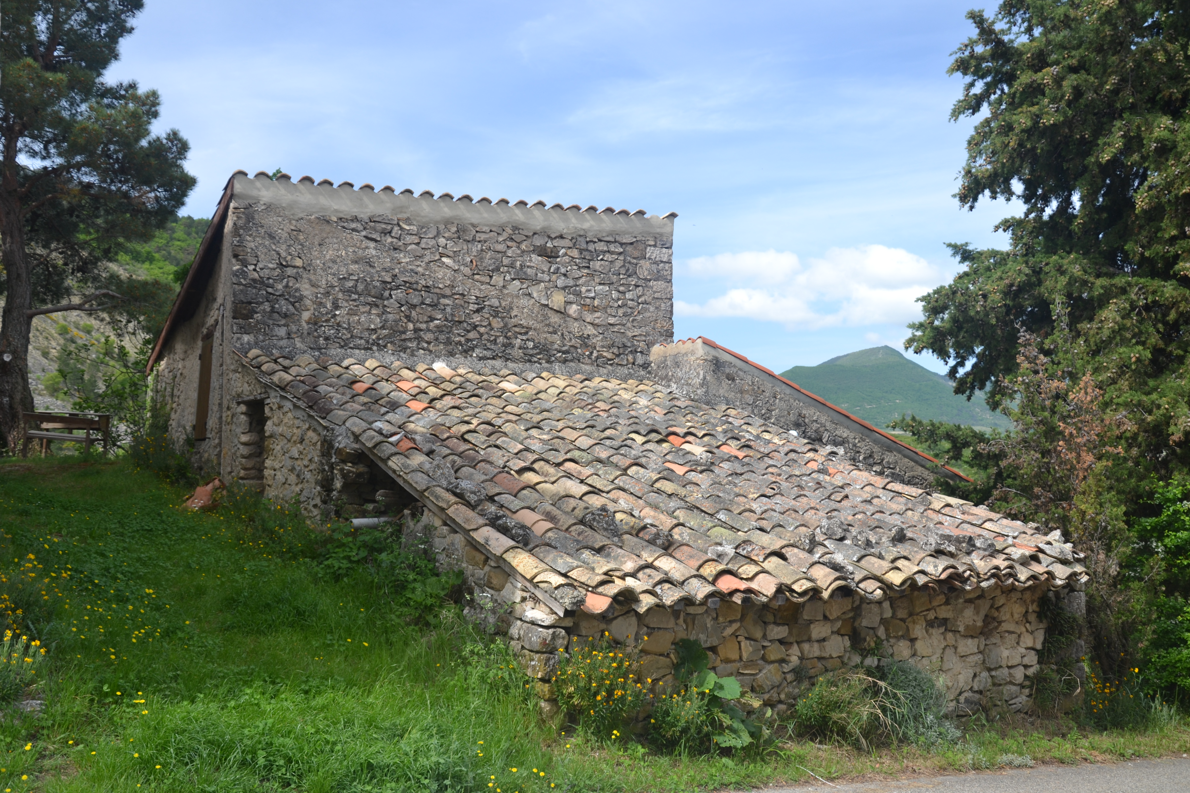 Maison en pierres à Bésignan